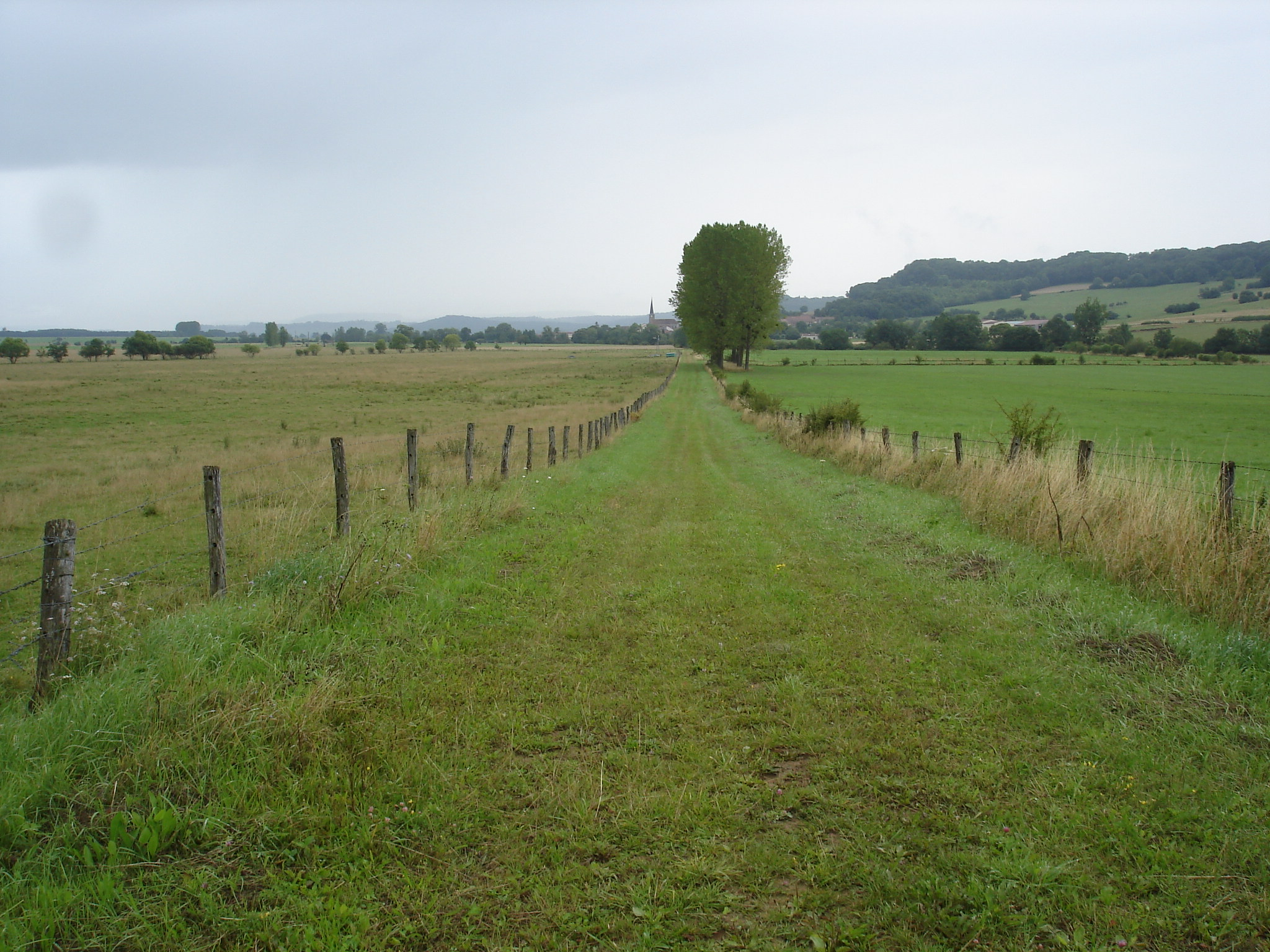 Un segment de la voie romaine de Langres à Trèves au sud de Meuvy